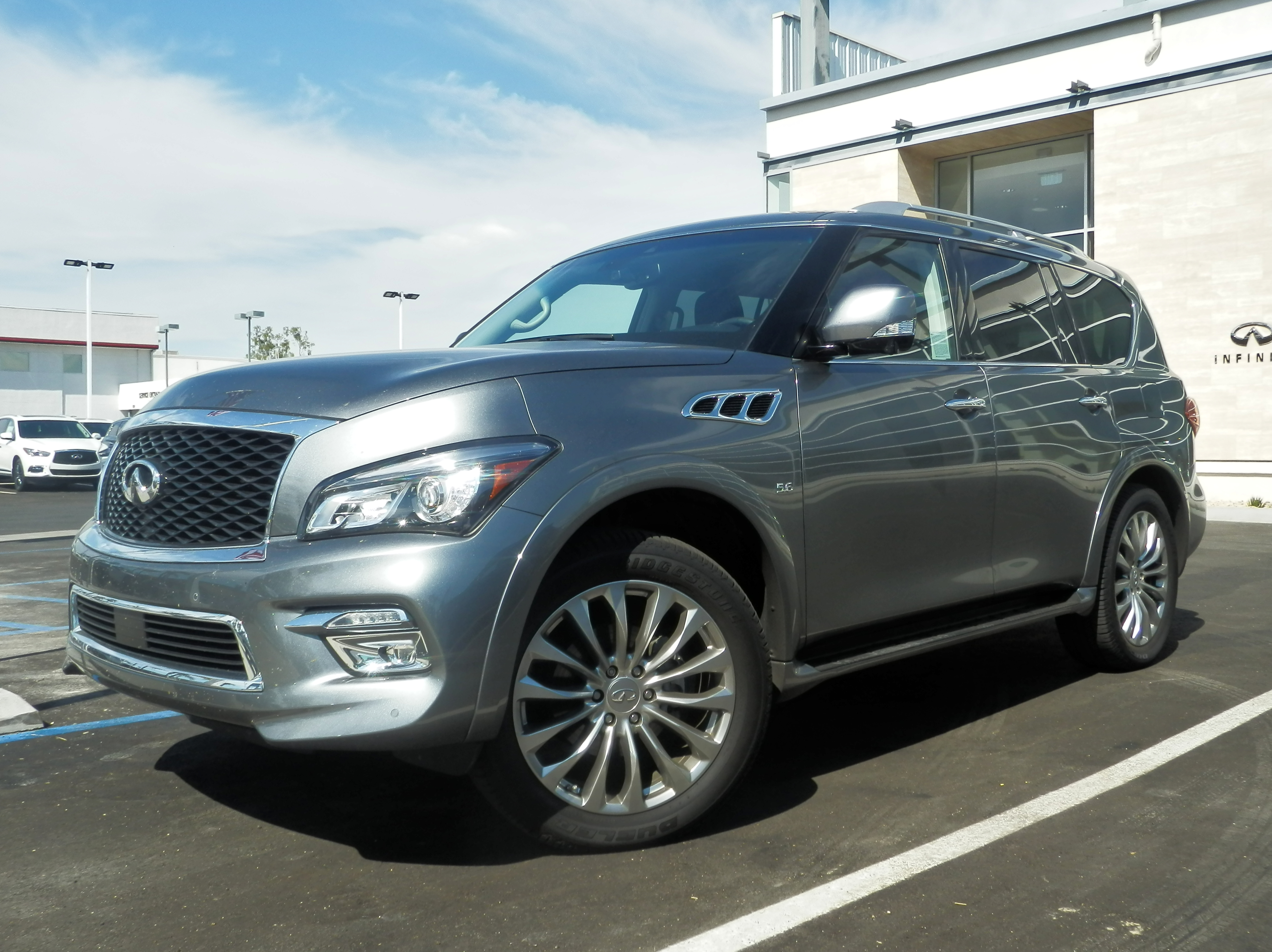 Infiniti QX80 in Bakersfield